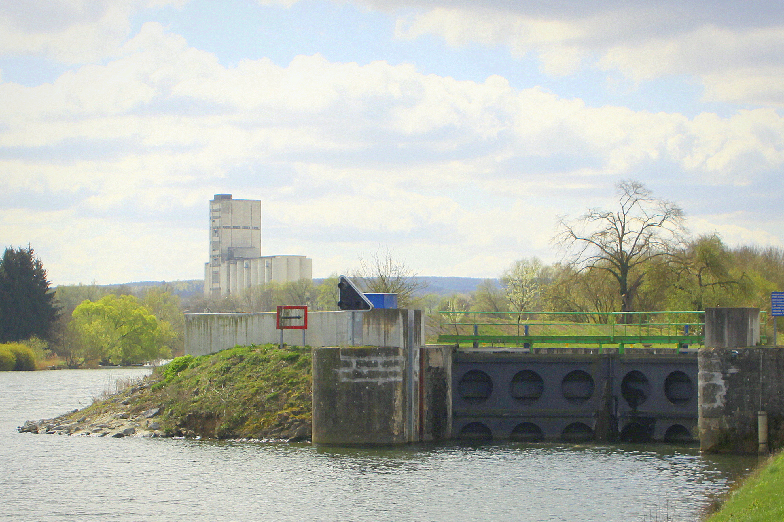 Schleis Quatre Cheminées, ënnescht Paart.